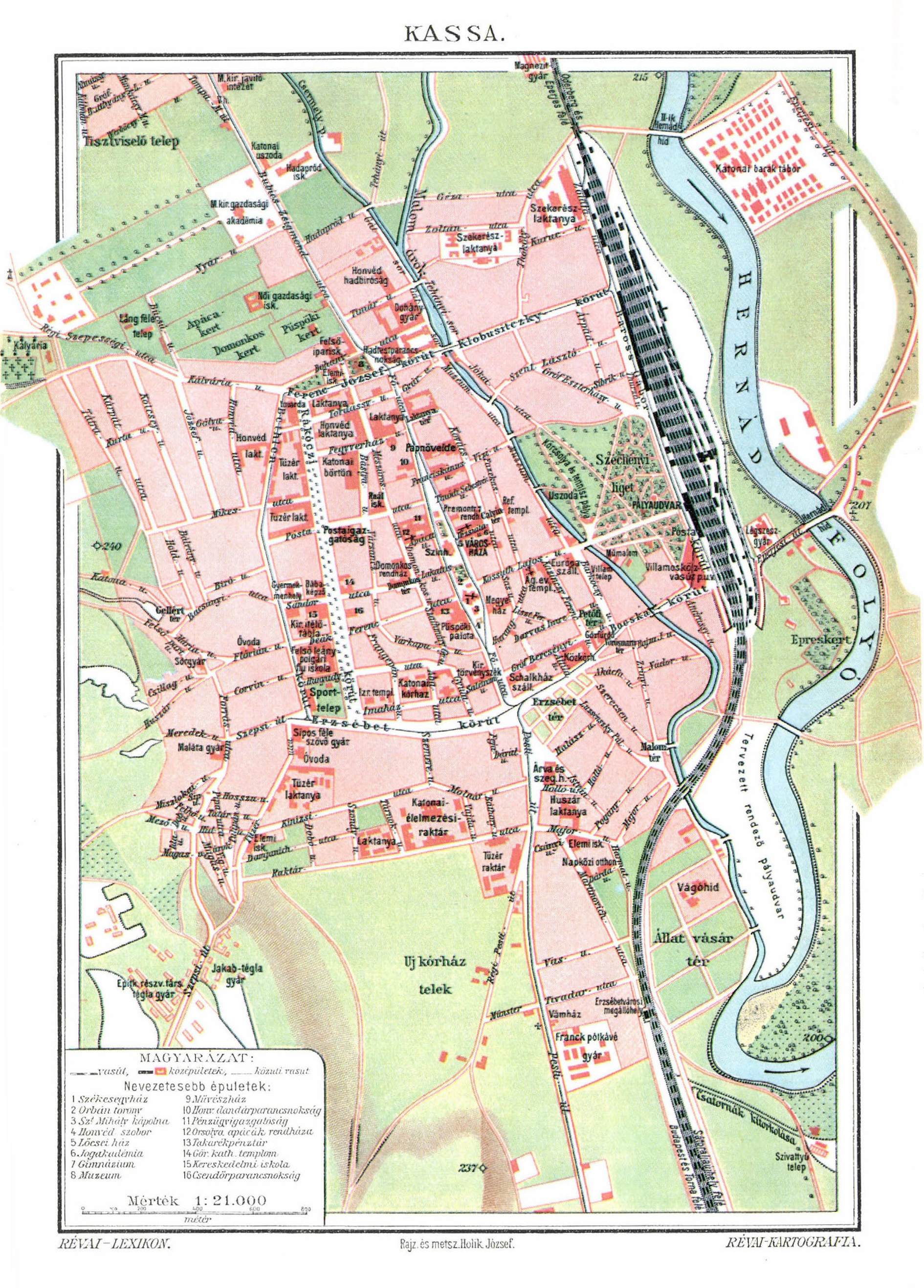 Révai Lexikon, Rajzolta: Holik József, Kassa város térképe, Trianon előtt